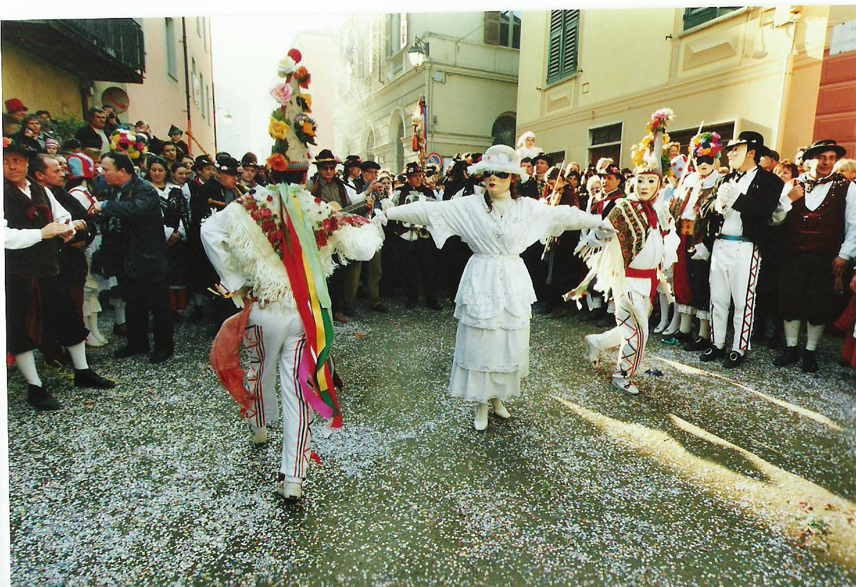 Il Calisun di Rocca Grimalda 2004